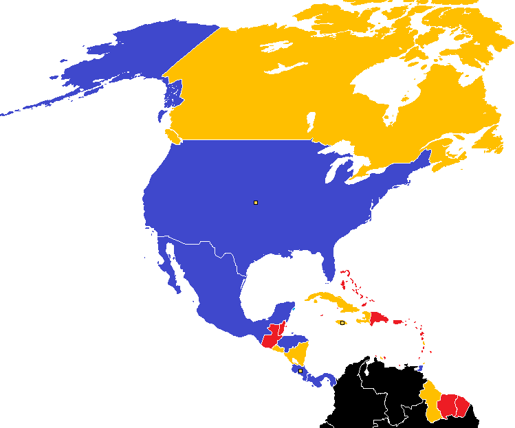 Estos son los seleccionados que van a participar en la Copa Oro de la Concacaf 2019